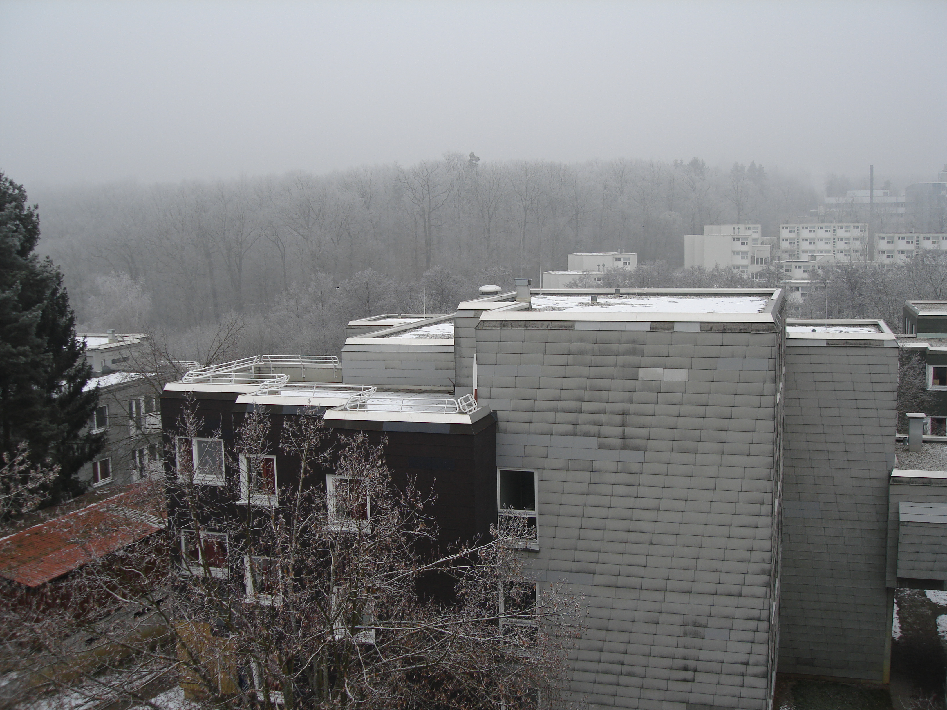 Studentenwohnheime "Allmandring I", Universität Stuttgart, Vaihingen date: 03.02.2006 by: Christoph Hoffmann